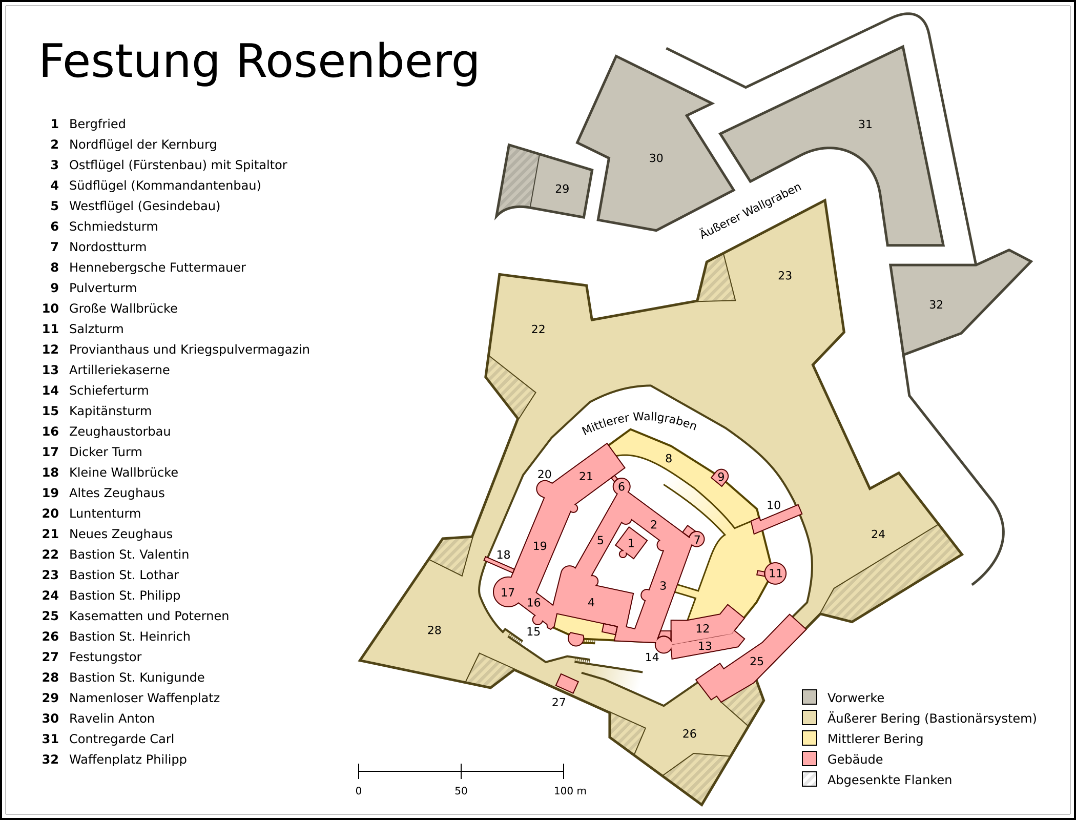 Lageplan der Festung Rosenberg in Kronach